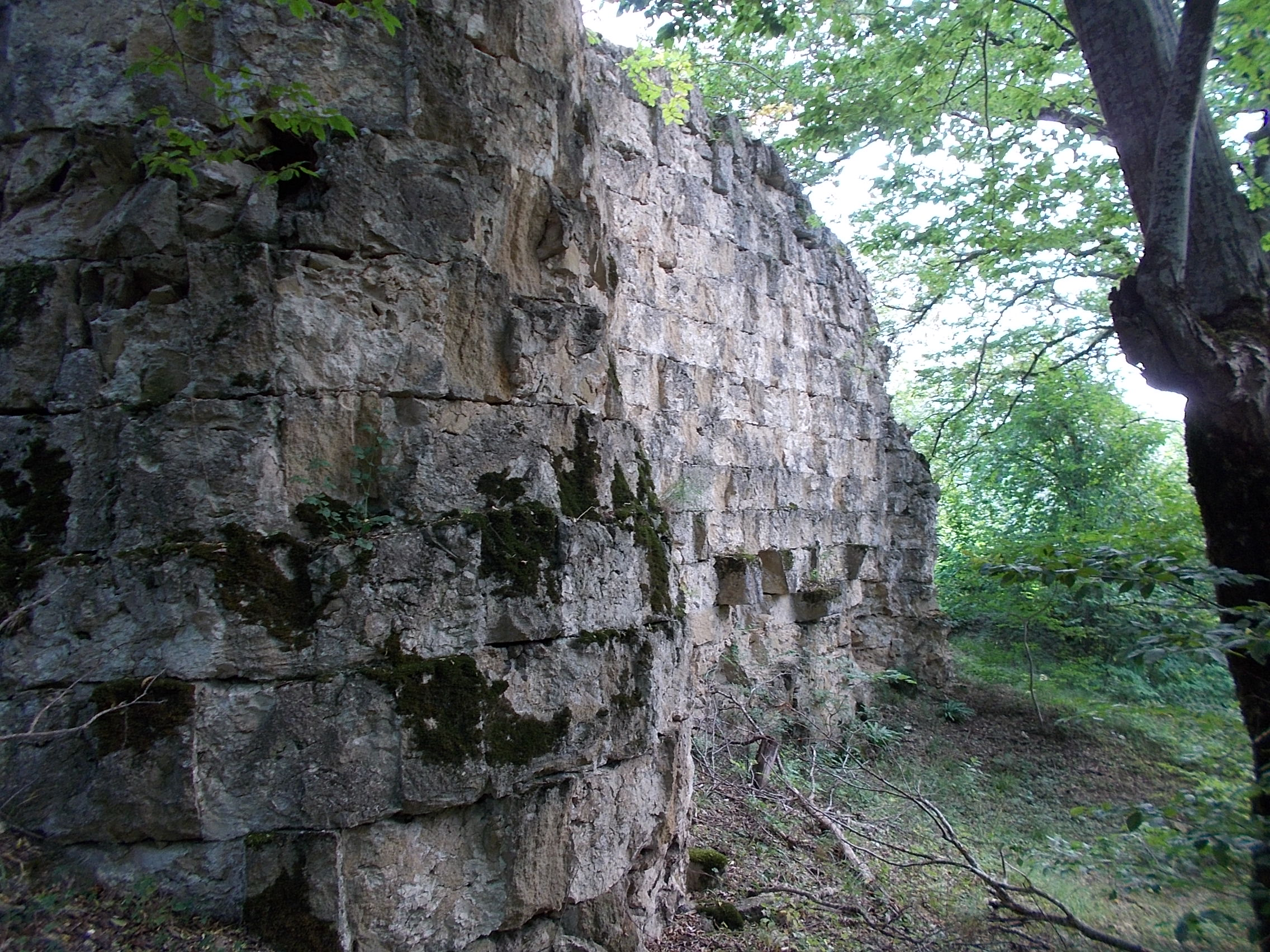 Форты стены "Даг-Бары" (часть великой Кавказской стены): с. Зиль, от цитадели "Нарын-Кала" до Табасарана, Дербент, Дагестан